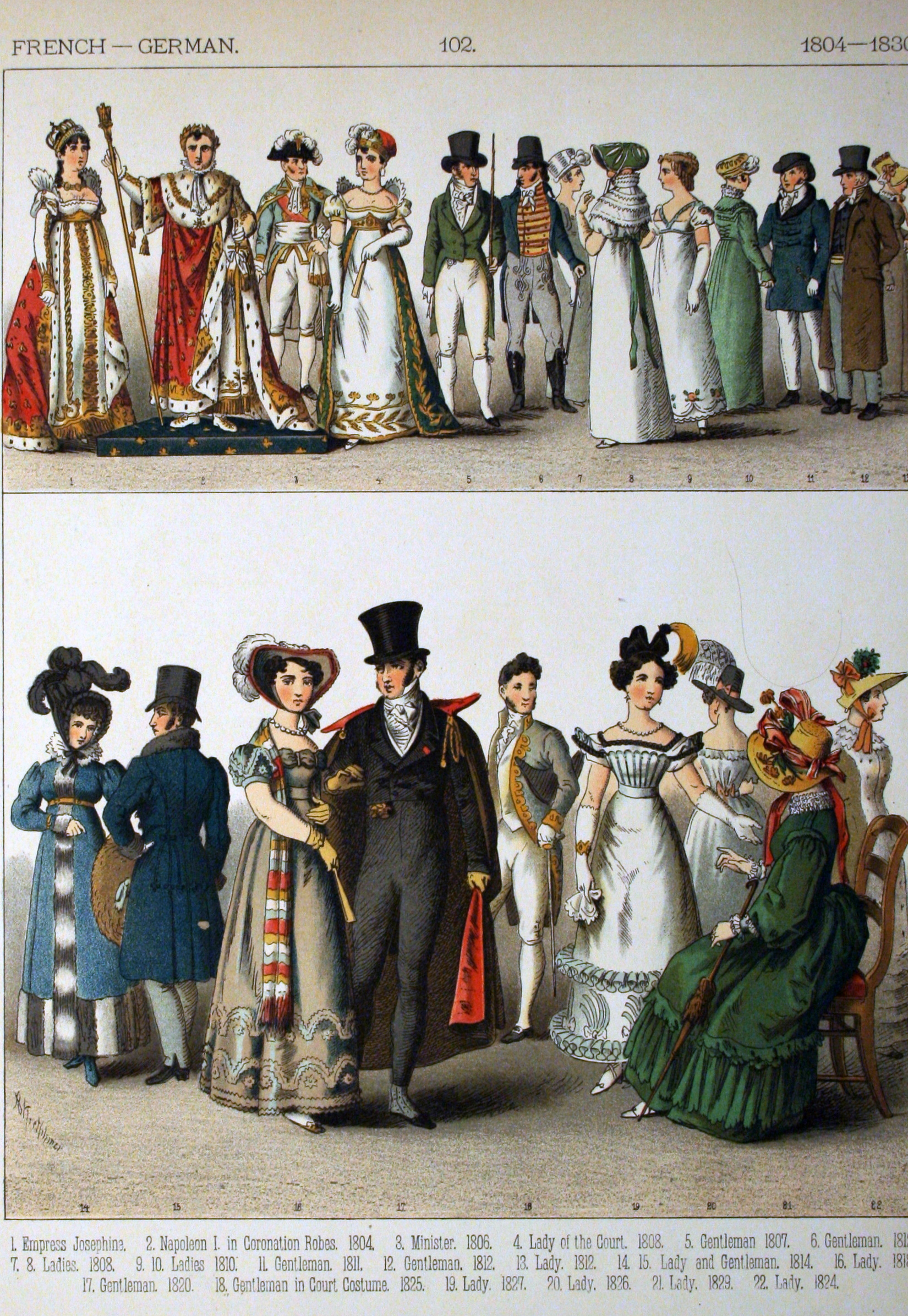 1804-1830, French - German